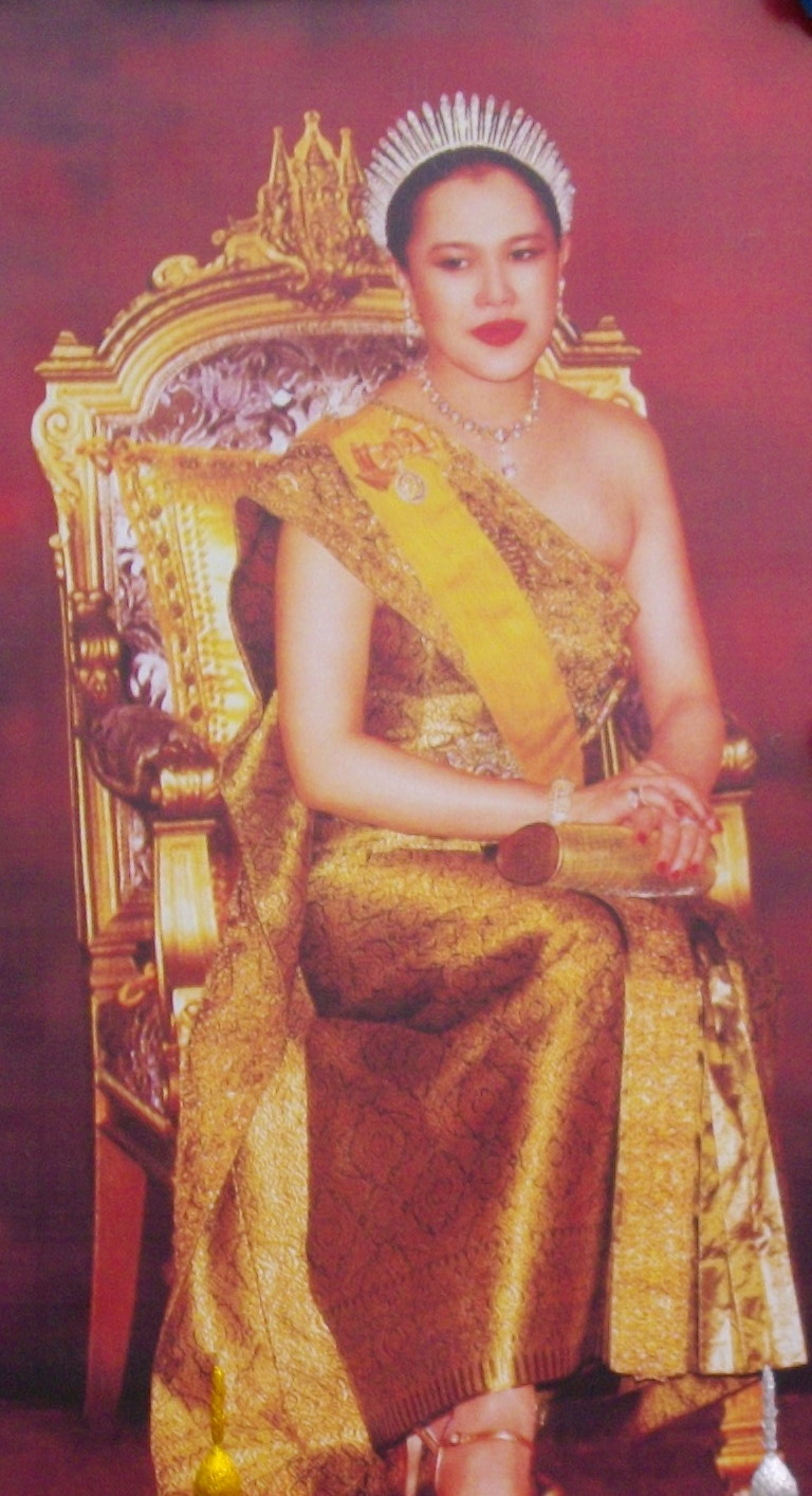 การประดับพระบรมฉายาลักษณ์เฉลิมพระเกียรติเนื่องในงานเฉลิมพระชนมพรรษา ในภาพนี้เป็นพระบรมฉายาลักษณ์สมเด็จพระนางเจ้าสิริกิติ์ พระบรมราชินีนาถ ประดับด้วยธงชาติไทยและธงตราสัญลักษณ์งานพระราชพิธีเฉลิมพระชนมพรรษาสมเด็จพระนางเจ้าสิริกิติ์ พระบรมราชินีนาถ ครบ 72 พรรษา วันที่ 12 สิงหาคม พ.ศ. 2547 ที่พิพิธภัณฑ์มิวเซียมสยาม (อาคารกระทรวงพาณิชย์เดิม) ย่านท่าเตียน กรุงเทพภาพนี้ถ่ายเมื่อวันที่ 4 กันยายน พ.ศ. 2551 ซึ่งล่วงเลยวันเฉลิมพระชนมพรรษาในปีนั้นมาได้เกือบ 1 เดือนแล้ว